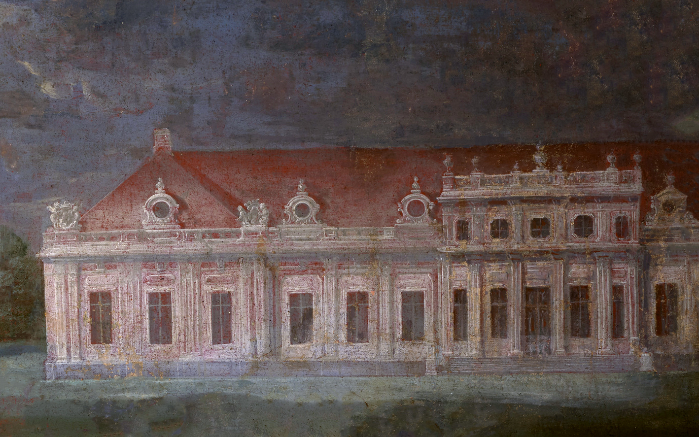 Беларуская (тарашкевіца): Воўчын (Voŭčyn), палац Чартарыйскіх (Čartaryjski)